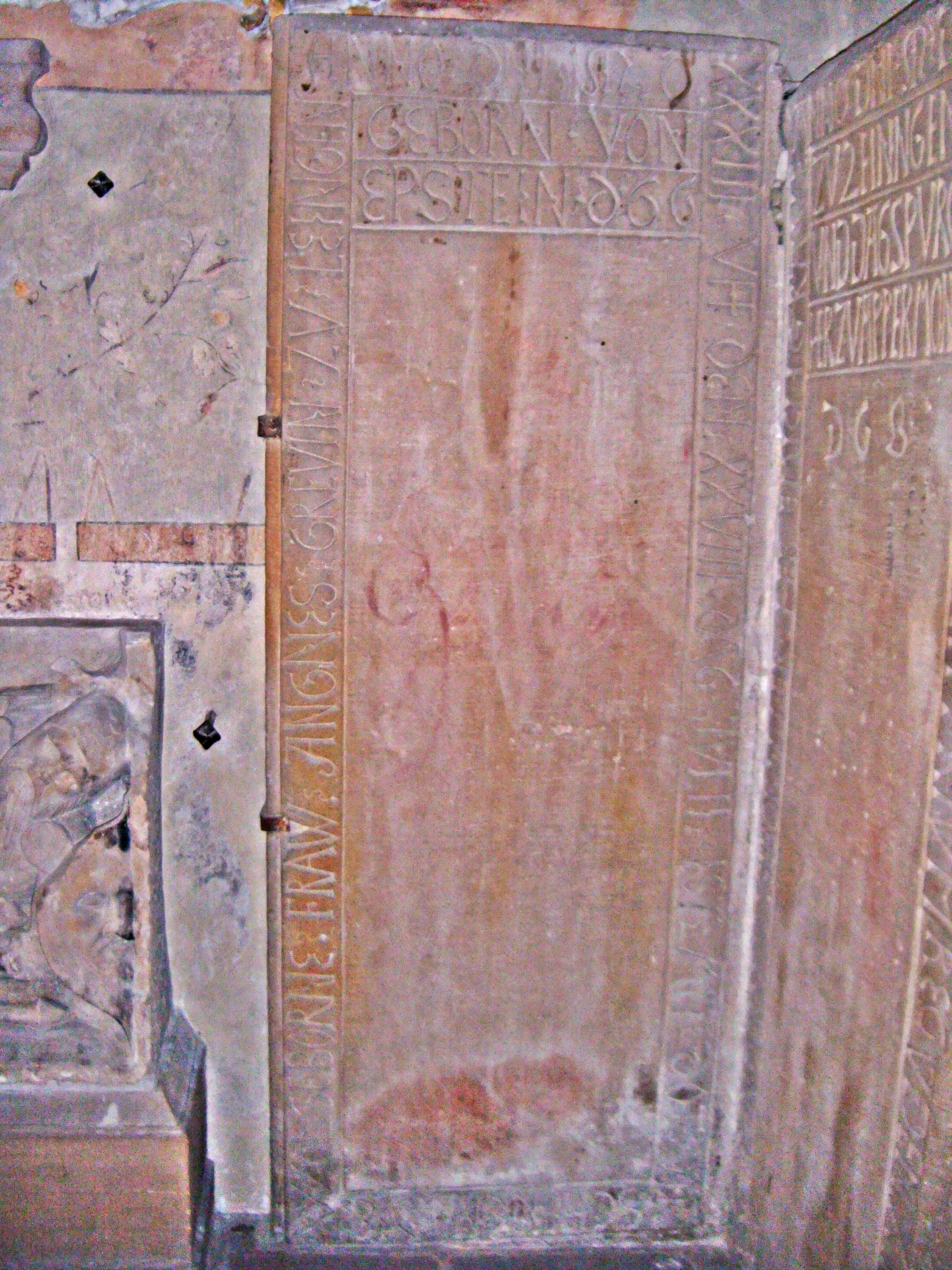 Bad Dürkheim, Schlosskirche, Leininger Grabkapelle, Epitaph Agnes von Leiningen-Hardenburg geb. von Eppstein (+ 1533)